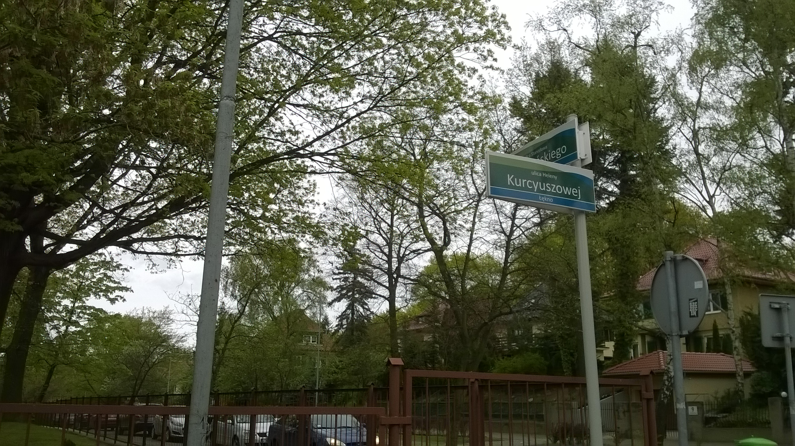 Ul. Stanisława Wyspiańskiego w Szczecinie, wylot ul. Heleny Kurcyuszowej - uliczki biegnącej stromo od al. Wojska Polskiego (w pobliżu placu Gałczyńskiego, z rzeźbą "Zaczarowana Dorożka") wprost do willi Heleny Kurcyusz (ul.Wyspiańskiego 7); po lewej - ogrodzenie boiska Liceum Ogólnokształcącego z Oddziałami Integracyjnymi (al. Wojska Polskiego 119).